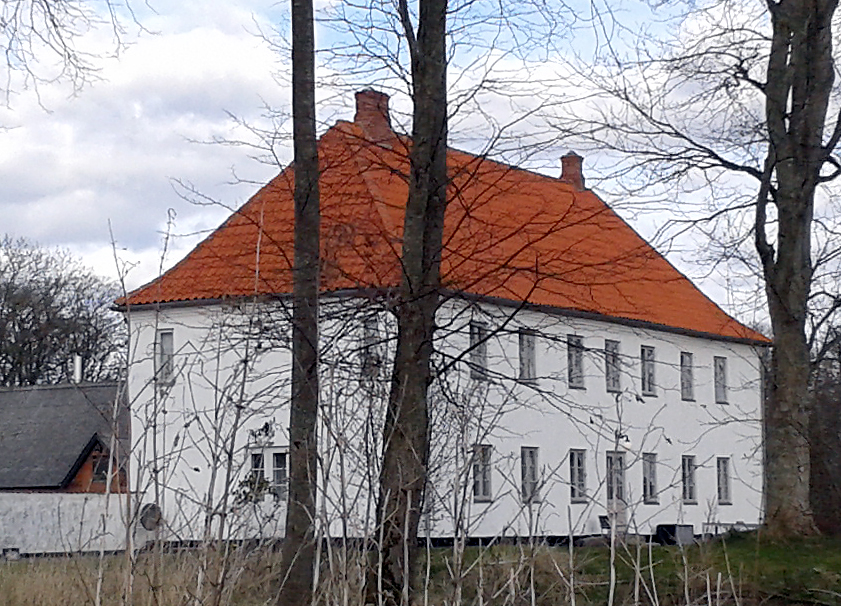 Strandet hovedgaard set fra sydvest